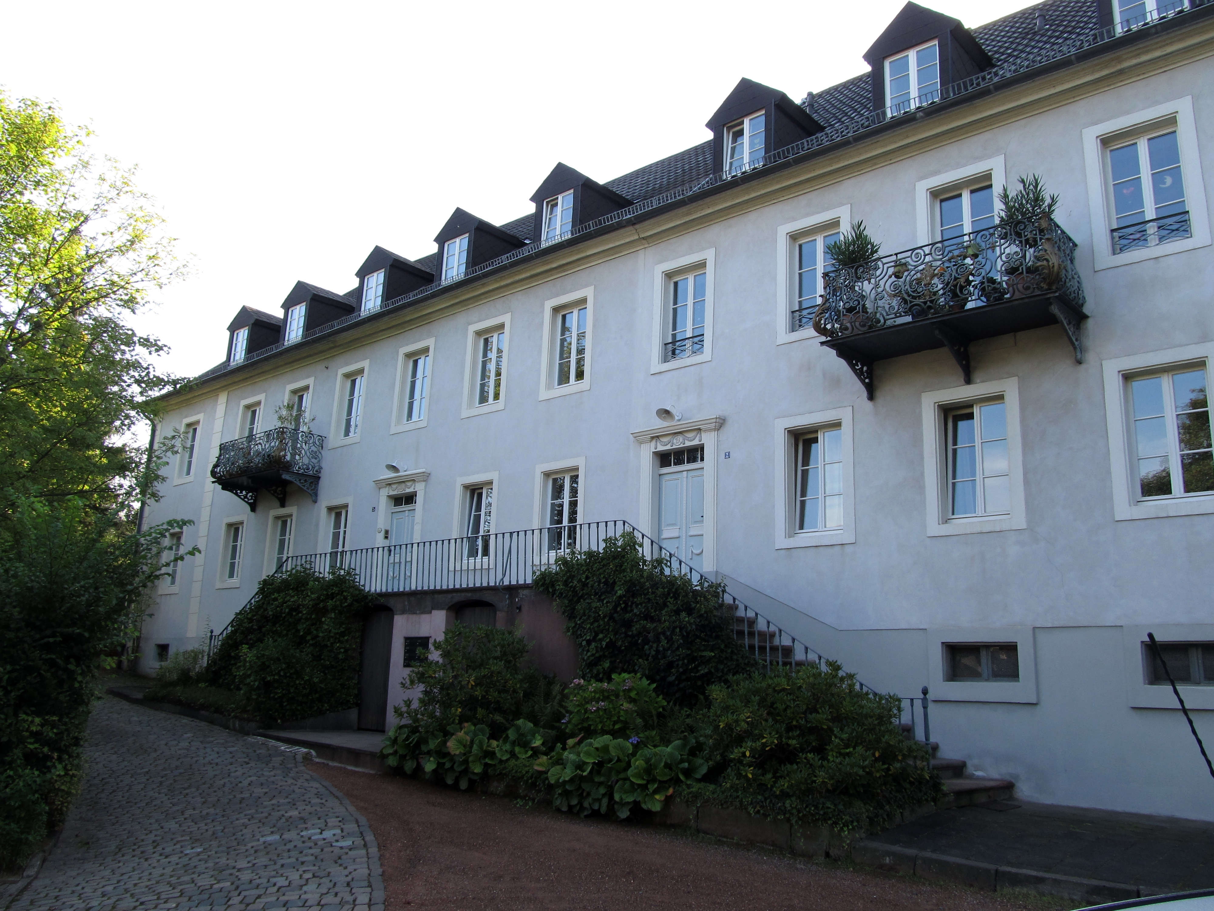 Ehemaliges Herrenhaus Appolt in Sulzbach, Saarland